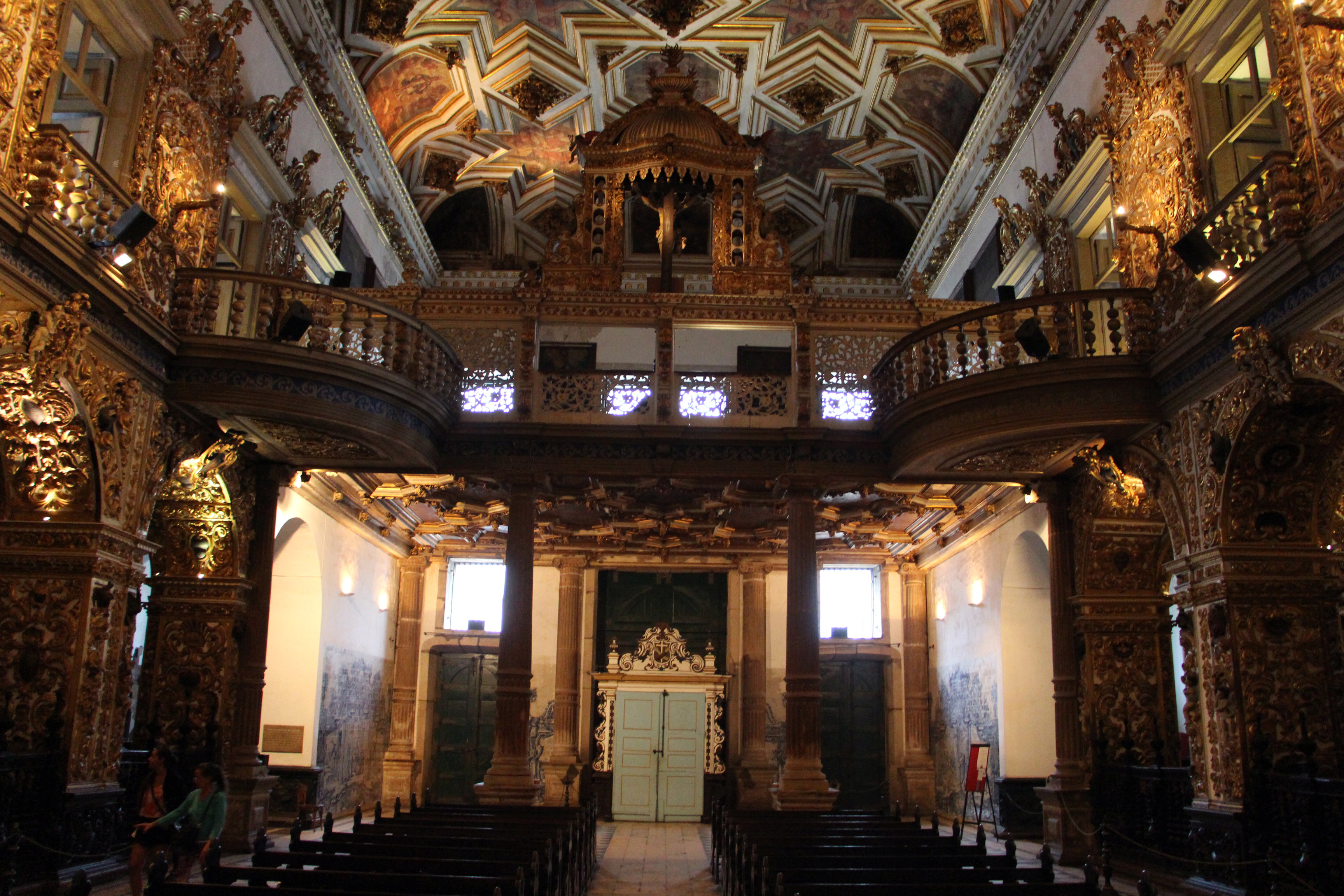 Igreja de São Francisco (Salvador)